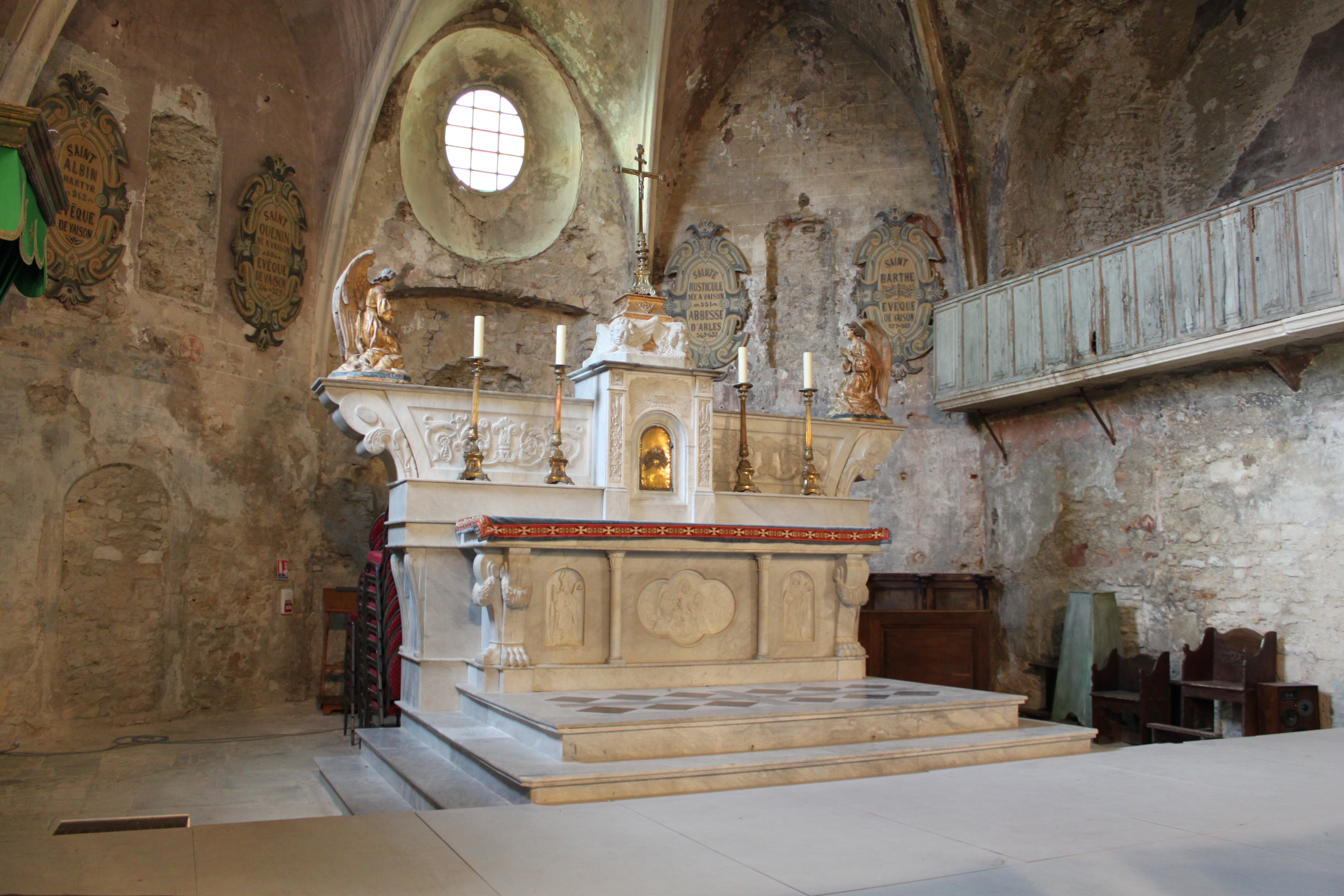 Vaison-la-Romaine, Vaucluse, France